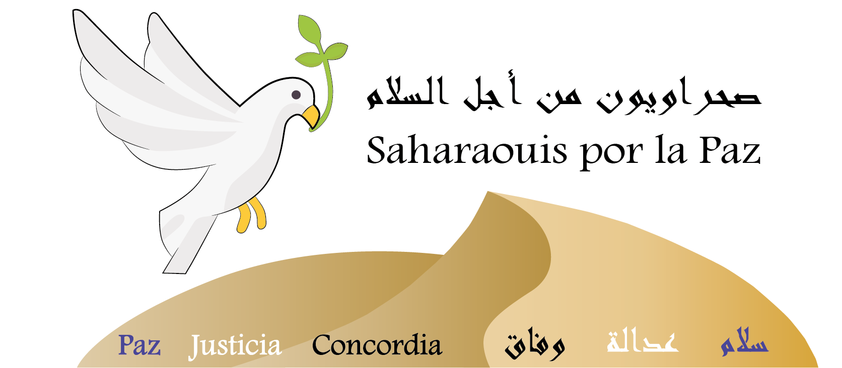 Saharauis Por la Paz, Movimientos Politicos, Norte de Africa